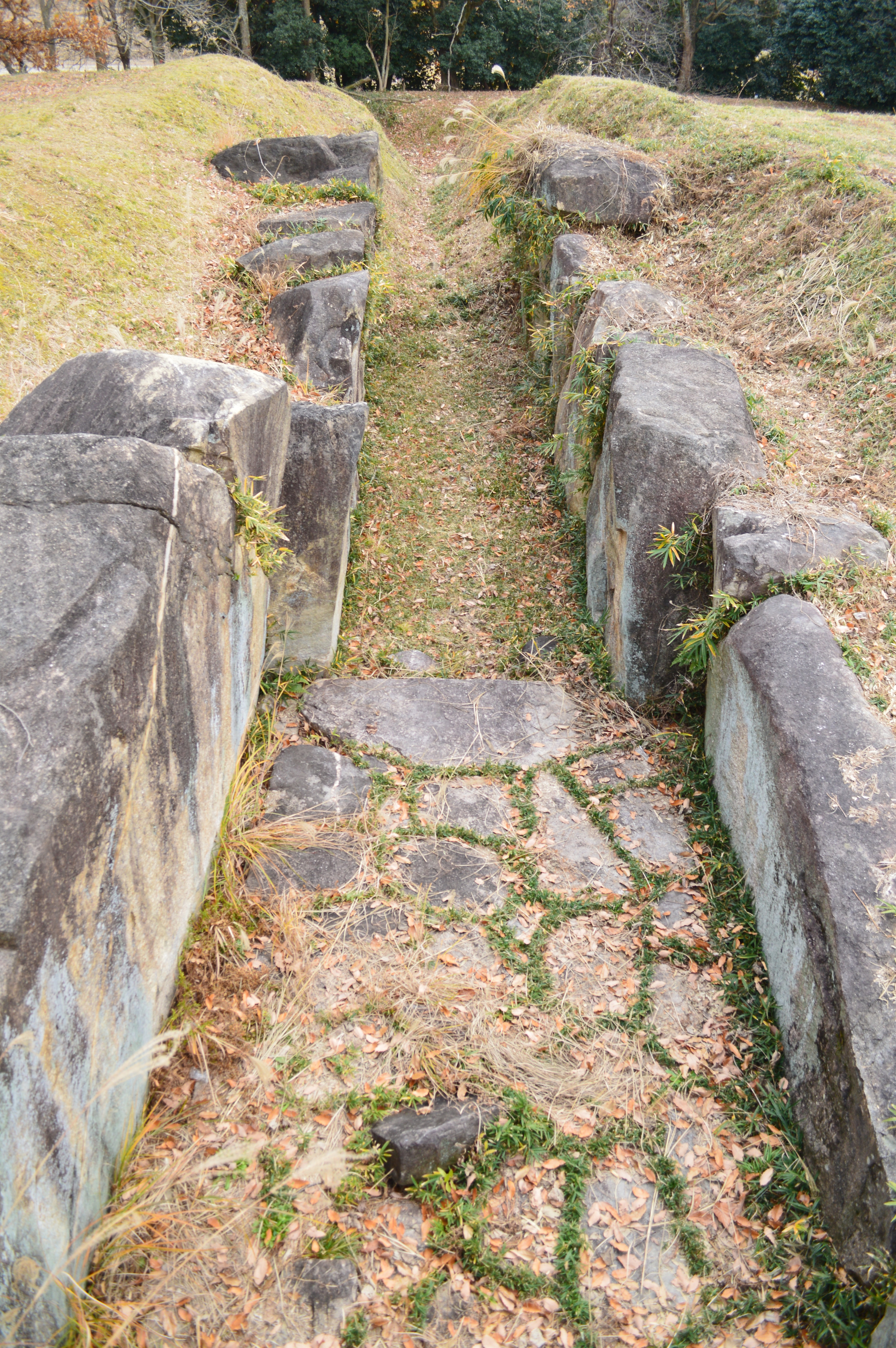 塚穴山古墳 石室概観